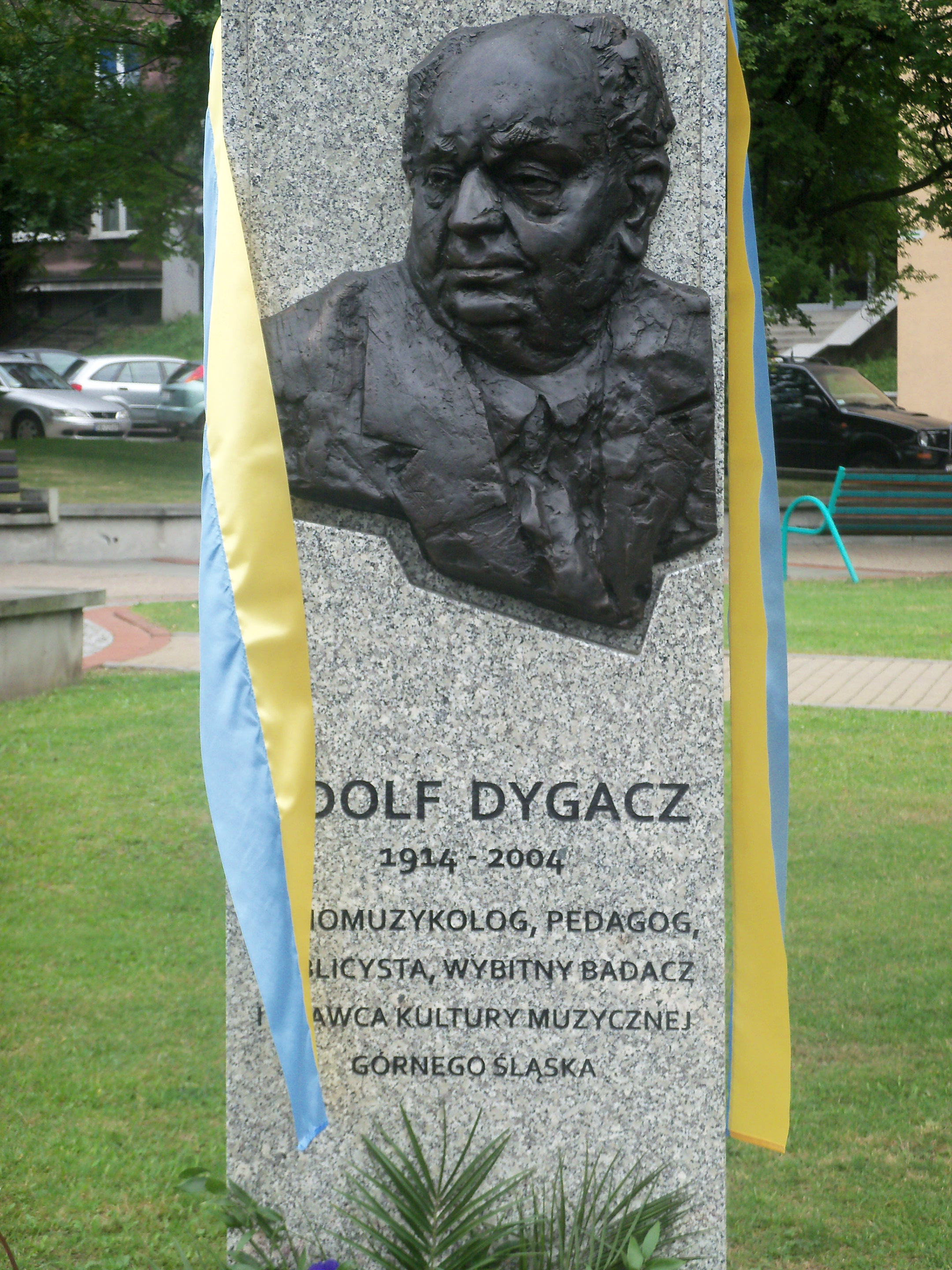 Tablica upamiętniająca Adolfa Dygacza na placu Grunwaldzkim w Katowicach